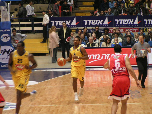 דרק שארפ צולם על-ידי אבי קדמי This picture was taken by Avi Kedmi